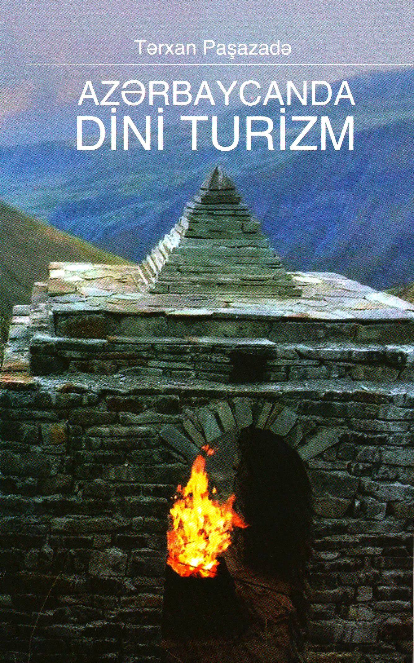 Tərxan Paşazadənin Azərbaycanda dini turizm kitabı (2018)